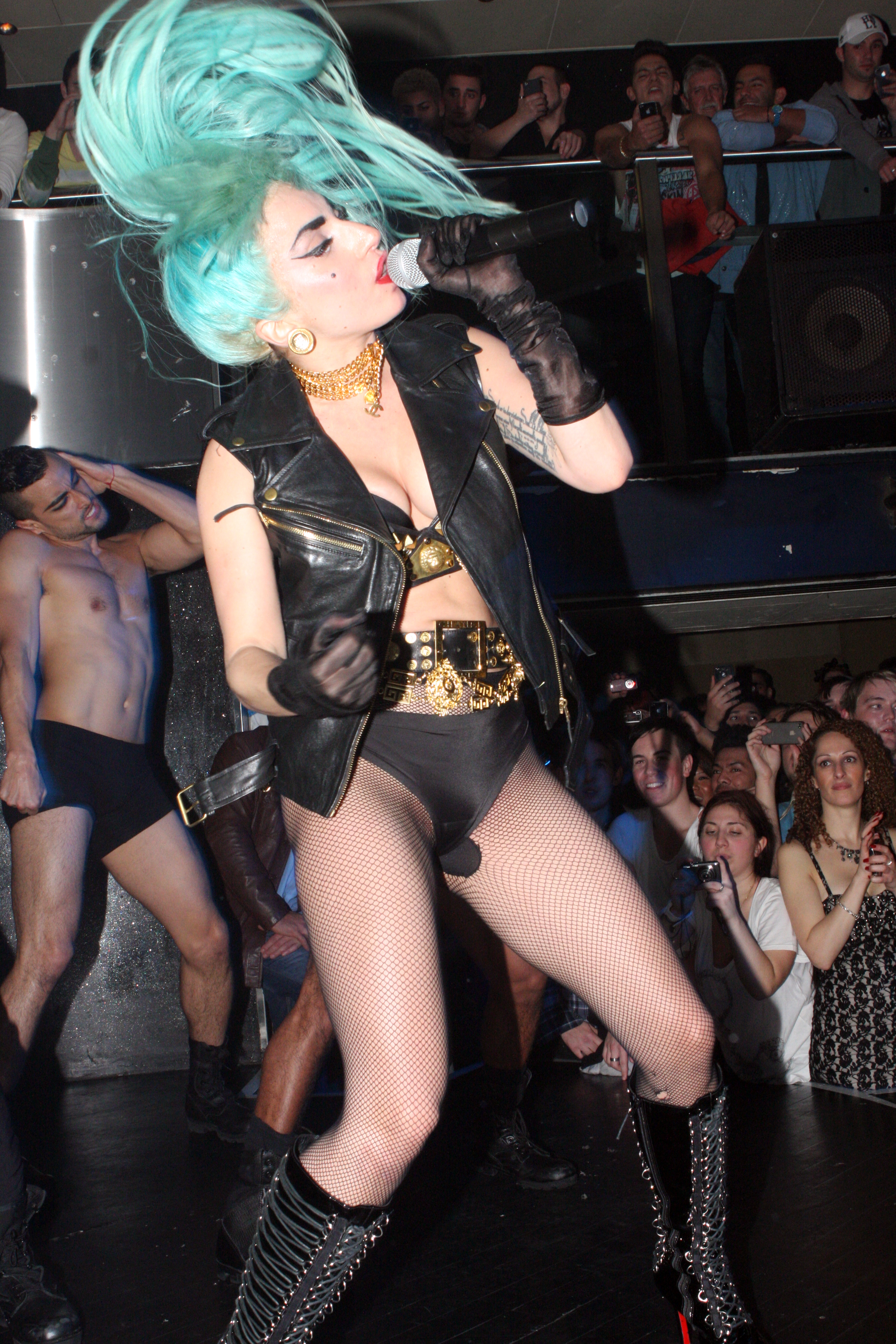 Lady Gaga